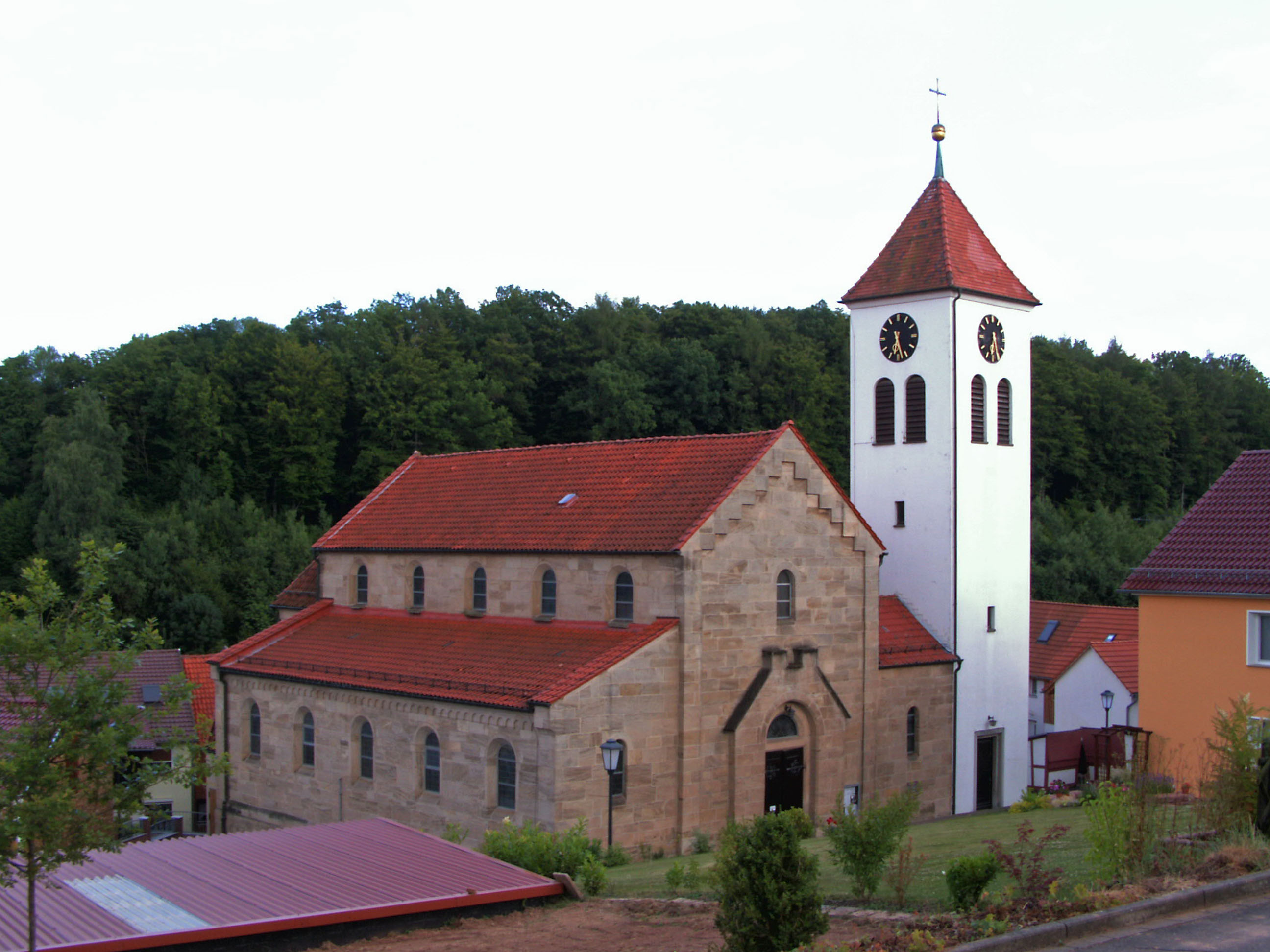 Katholische Kirche St. Pankratius in Fuhrbach bei Duderstadt